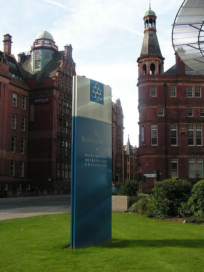 source OWN!!!